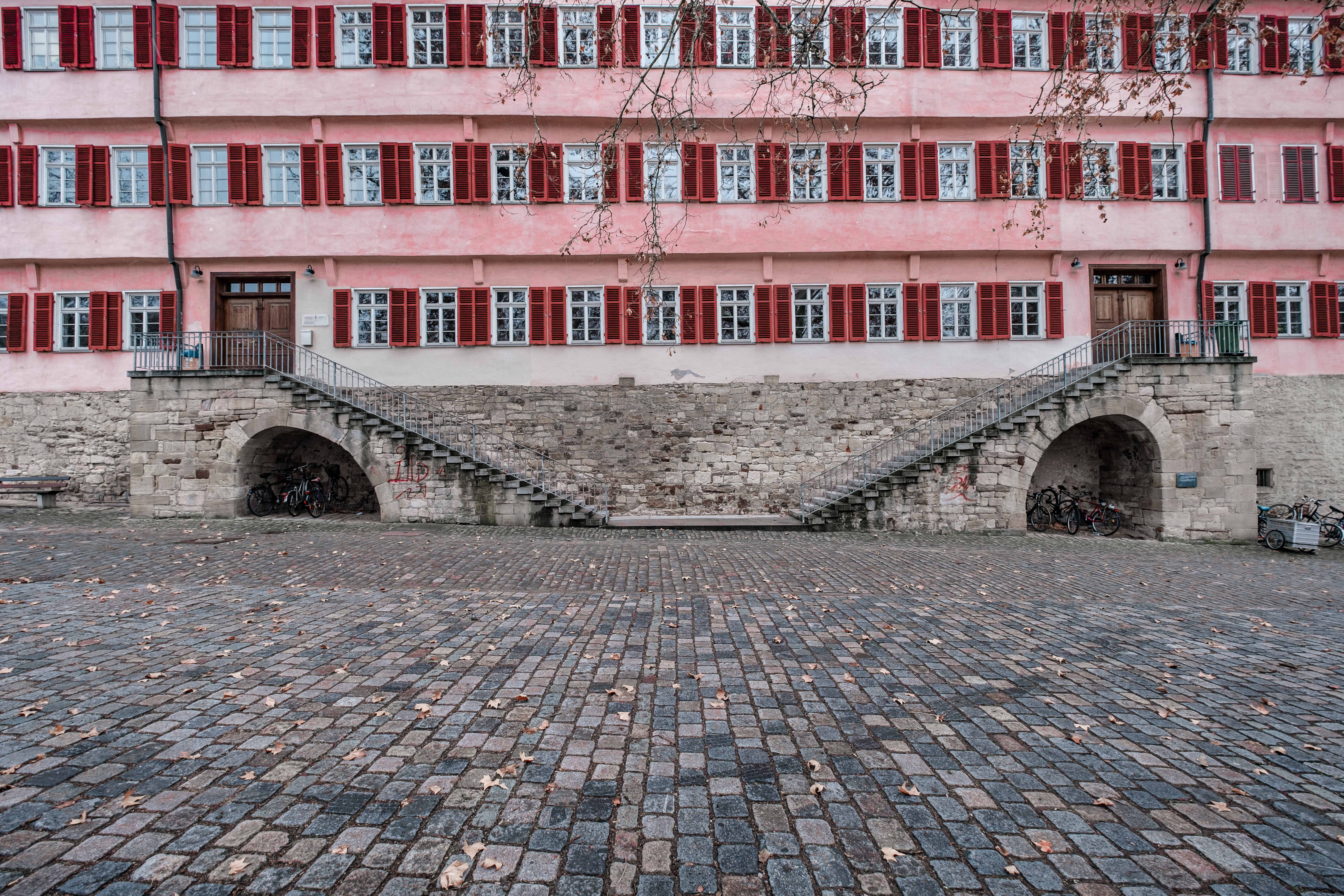 Alte Burse in Tübingen